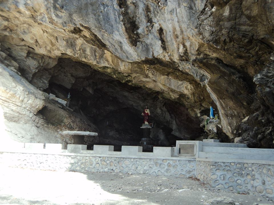 Tetun: Gruta Didimera